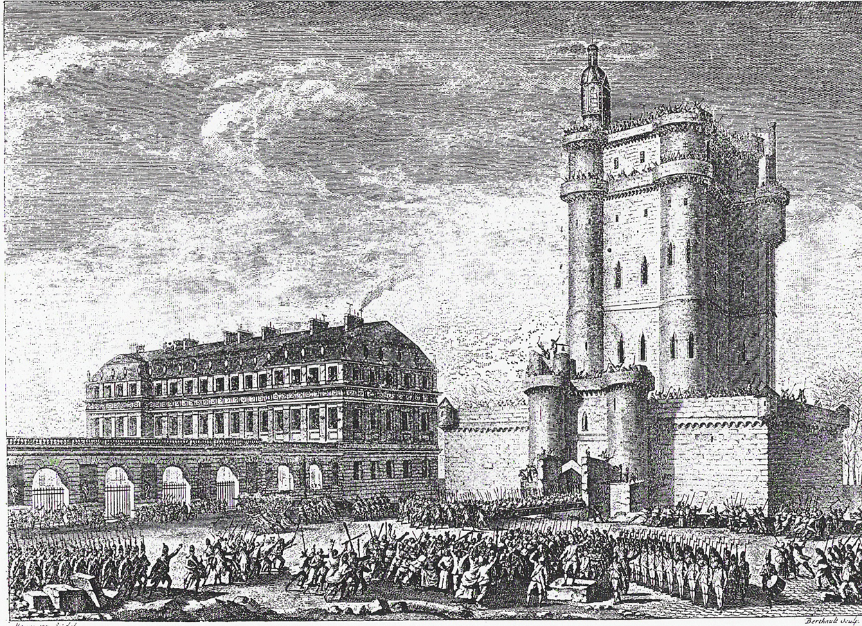 Christophe Muller: Vincennes. Sturm auf den Donjon am 28. Febr. 1791